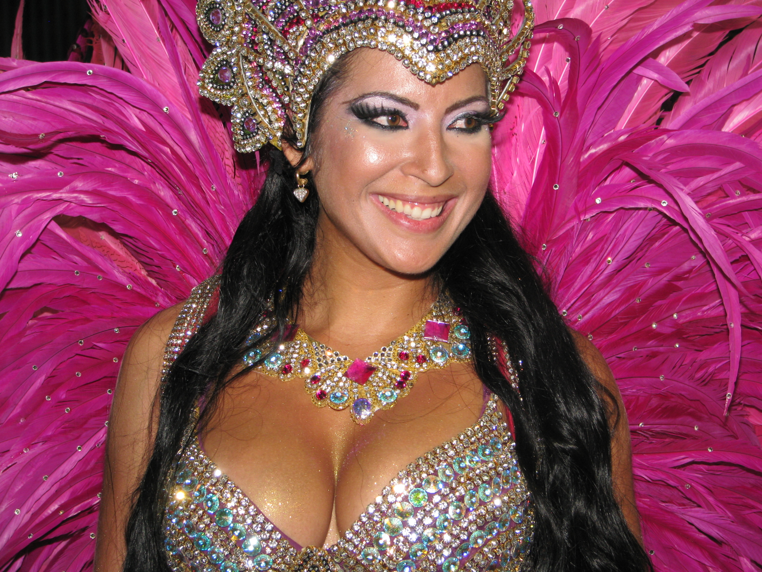 GRES Acadêmicos do Salgueiro Carnaval 2010 033